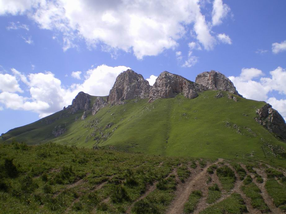 נוף במחוז גאנסו, סין רישיון נוצר על ידי משתמש:Gsella